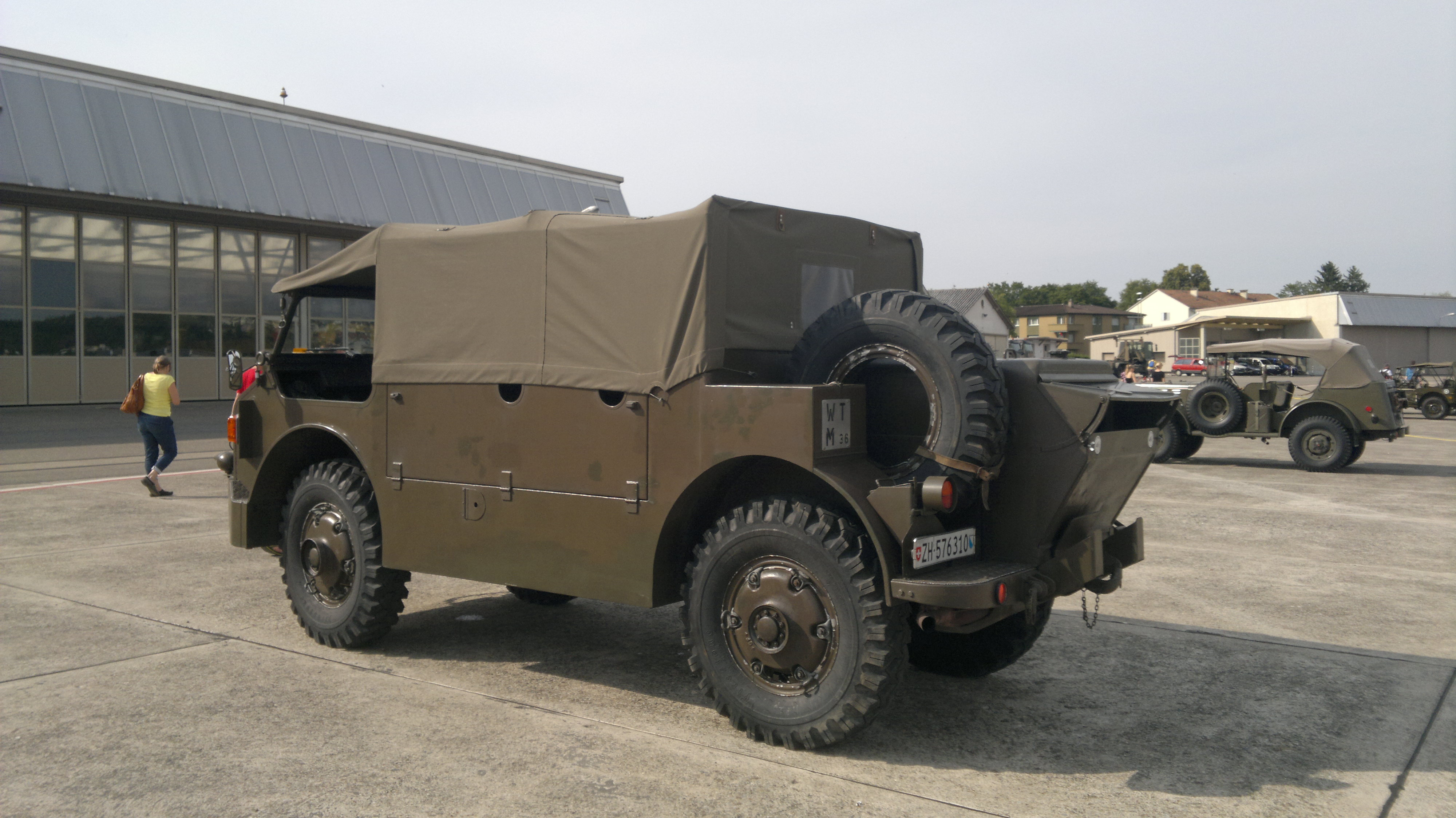 Seite Saurer Jeep